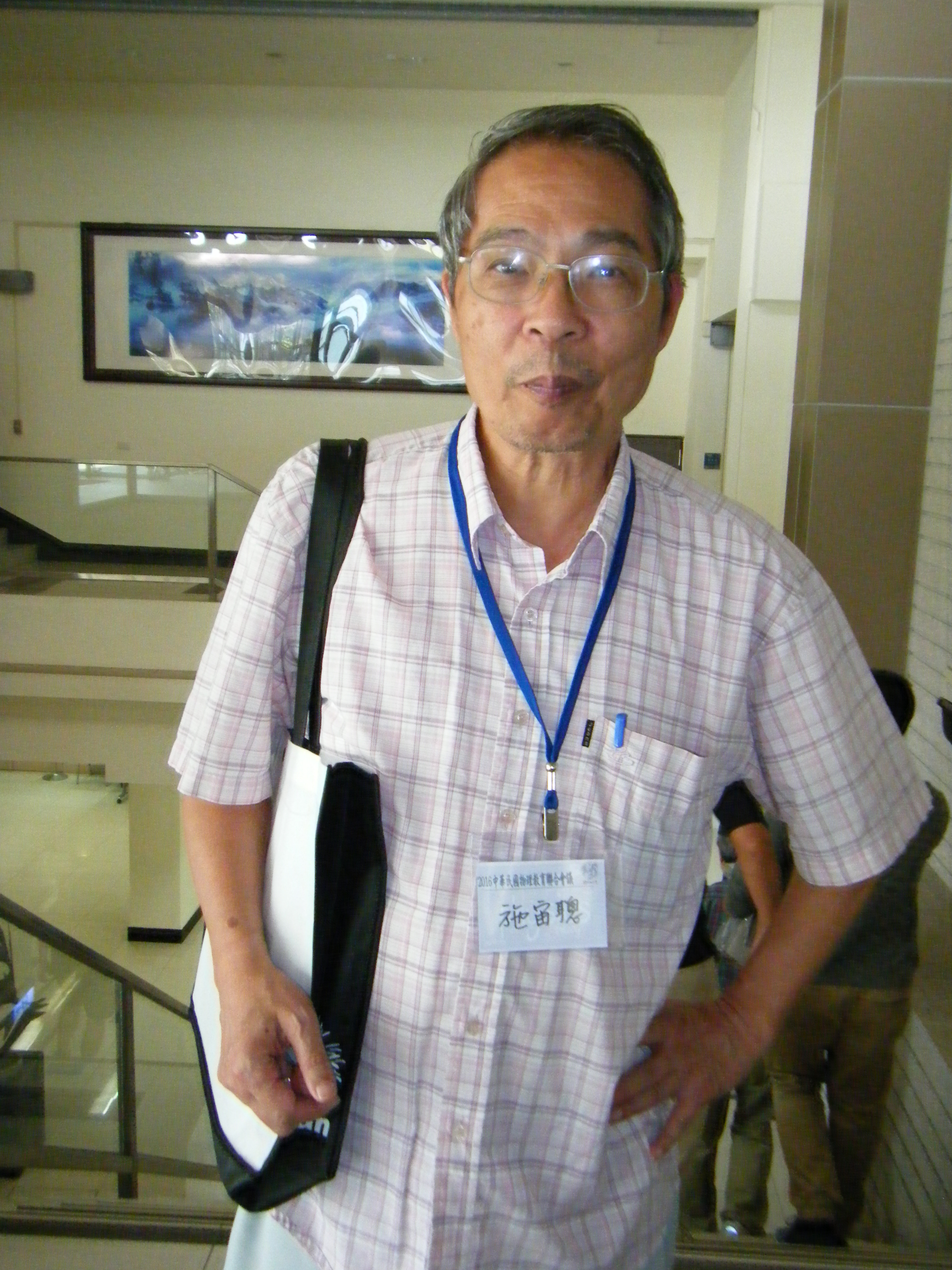 國立清華大學物理學系施宙聰教授